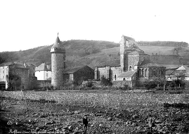 L'église Saint-Gal de Roffiac, photographiée par Séraphin-Médéric Mieusement.